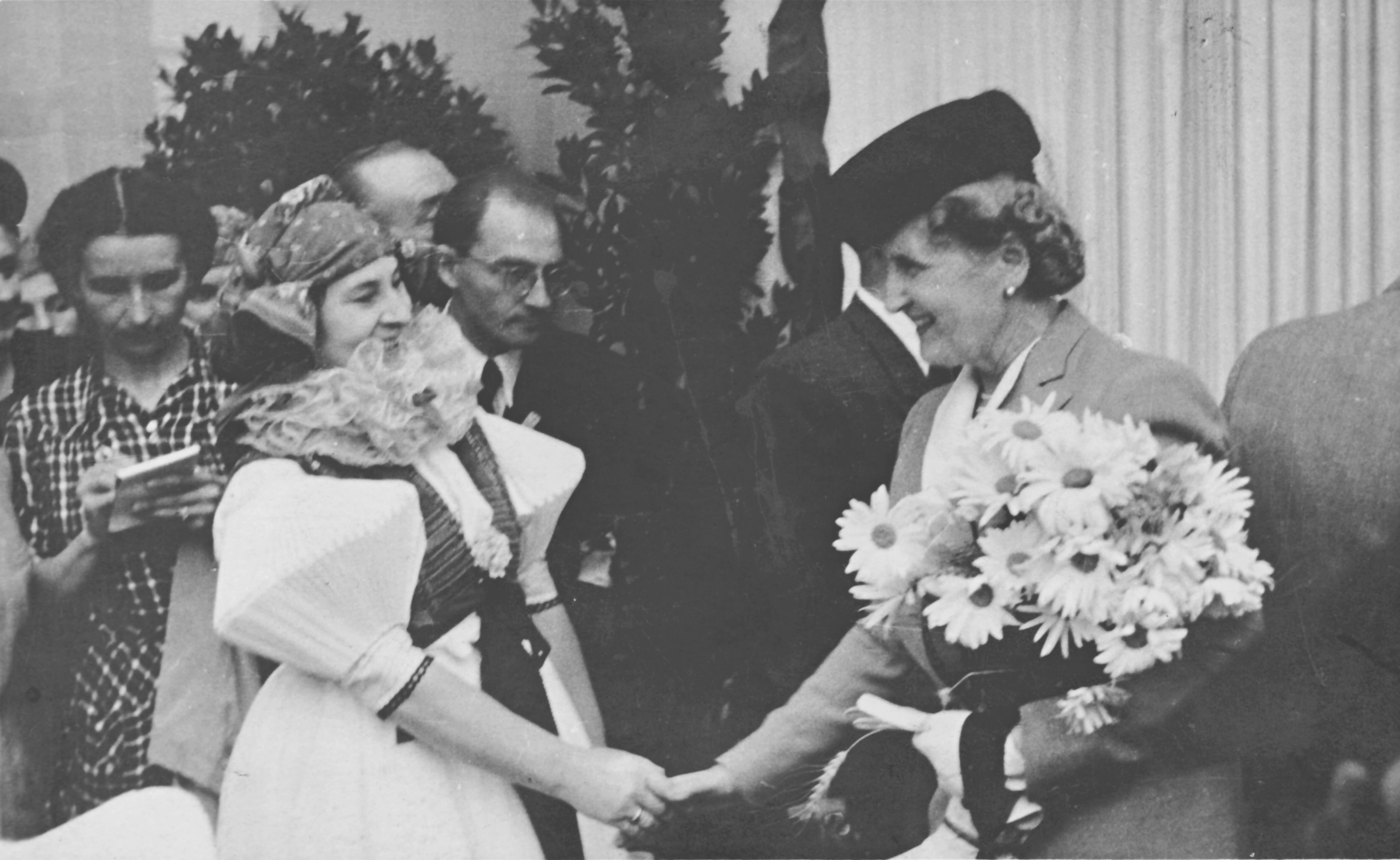 Hana Benešová (on the right), wife of the 2nd Czechoslovak president Edvard Beneš, visiting Olomouc. There is a handwritten text on the reverse side of the photograph; its English translation is: A memory of the visit of president Beneš and his wife, who is thanking for the national costume of the Haná region, which she has received as a gift from the city administration, in Olomouc in July 1946. Vlasta Navrátilová.